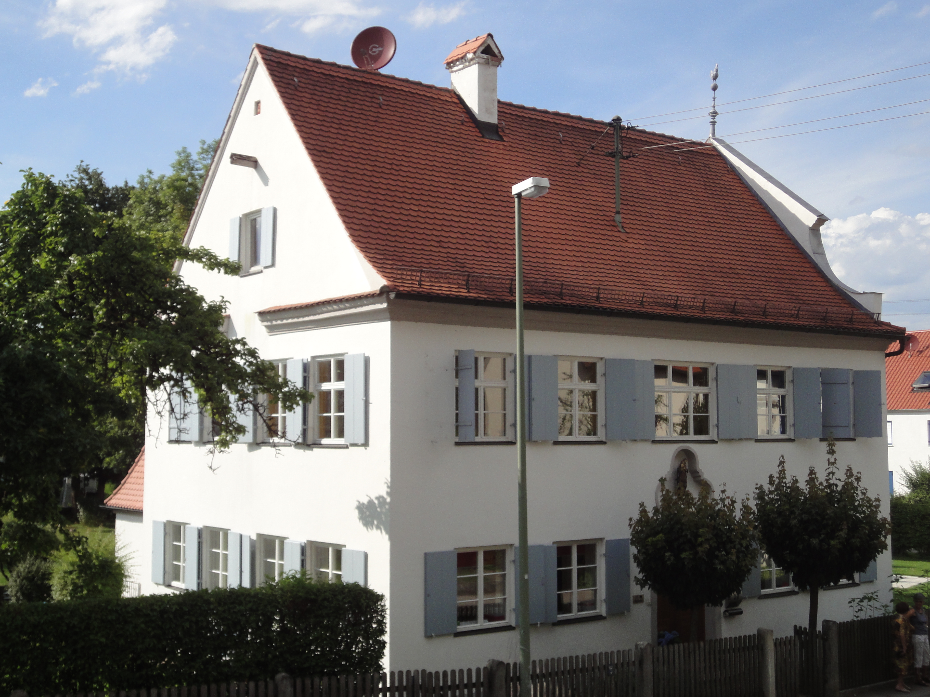 Altes Pfarrhaus, zweigeschossiger Satteldachbau mit Ziergiebel, 1753.